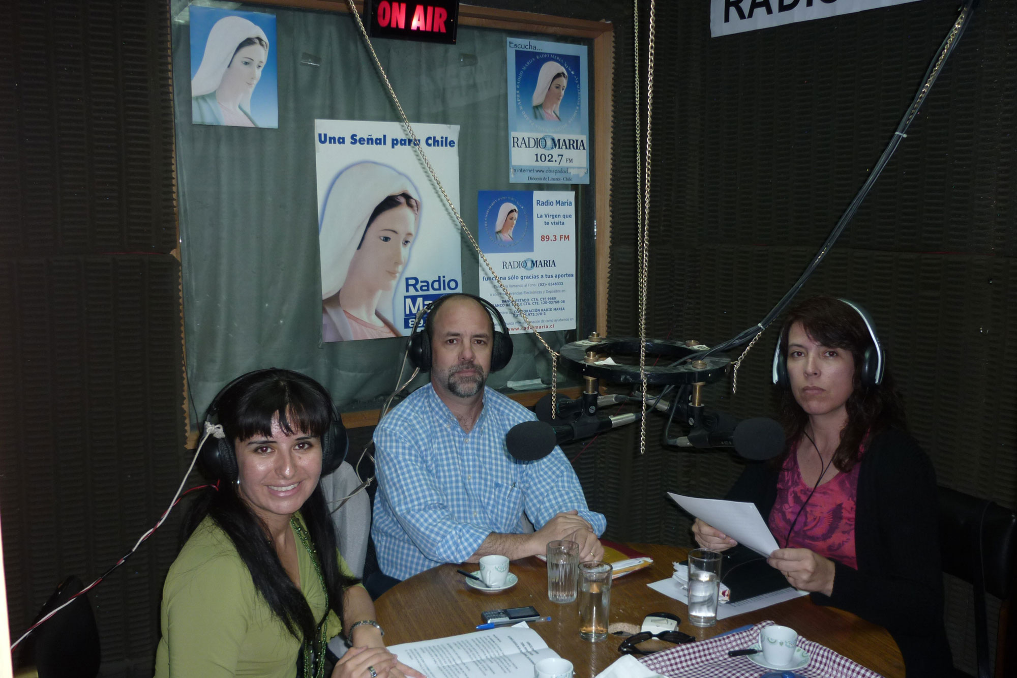 Radio María en Chile. “Construyendo familia” nació en 2008 para abordar los temas que afectan a la familia en la actualidad.